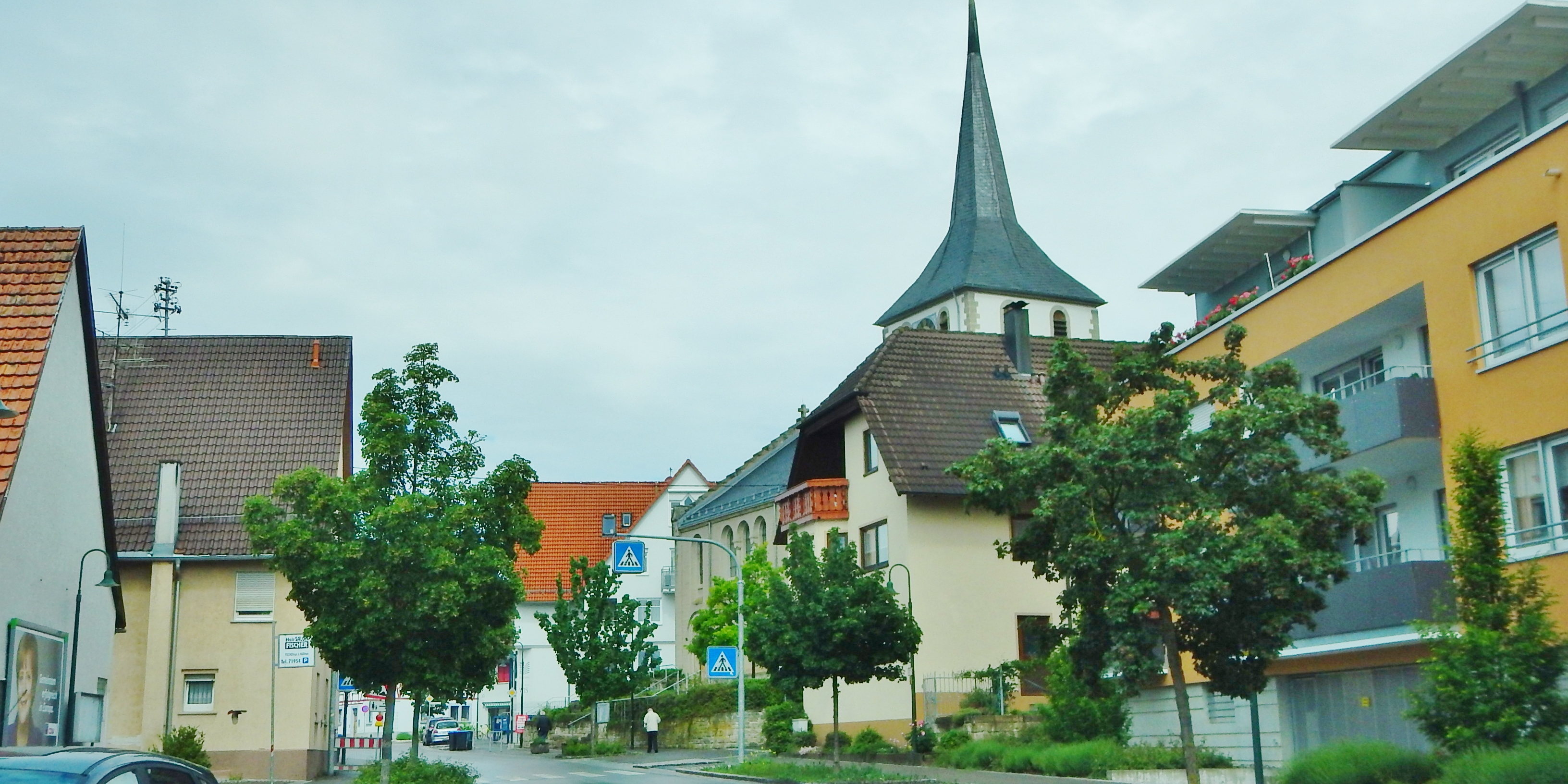 Nebringen, Gäufelden